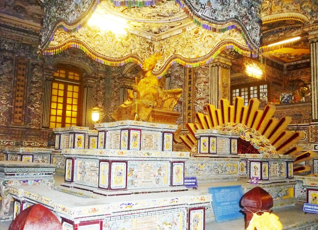 Thể loại:Nhà Nguyễn Thể Loại:Di tích cố đô Huế Thể loại:Lăng tẩm các Vua chúa Nguyễn Thể loại:Di tích ngoài Kinh Thành Huế